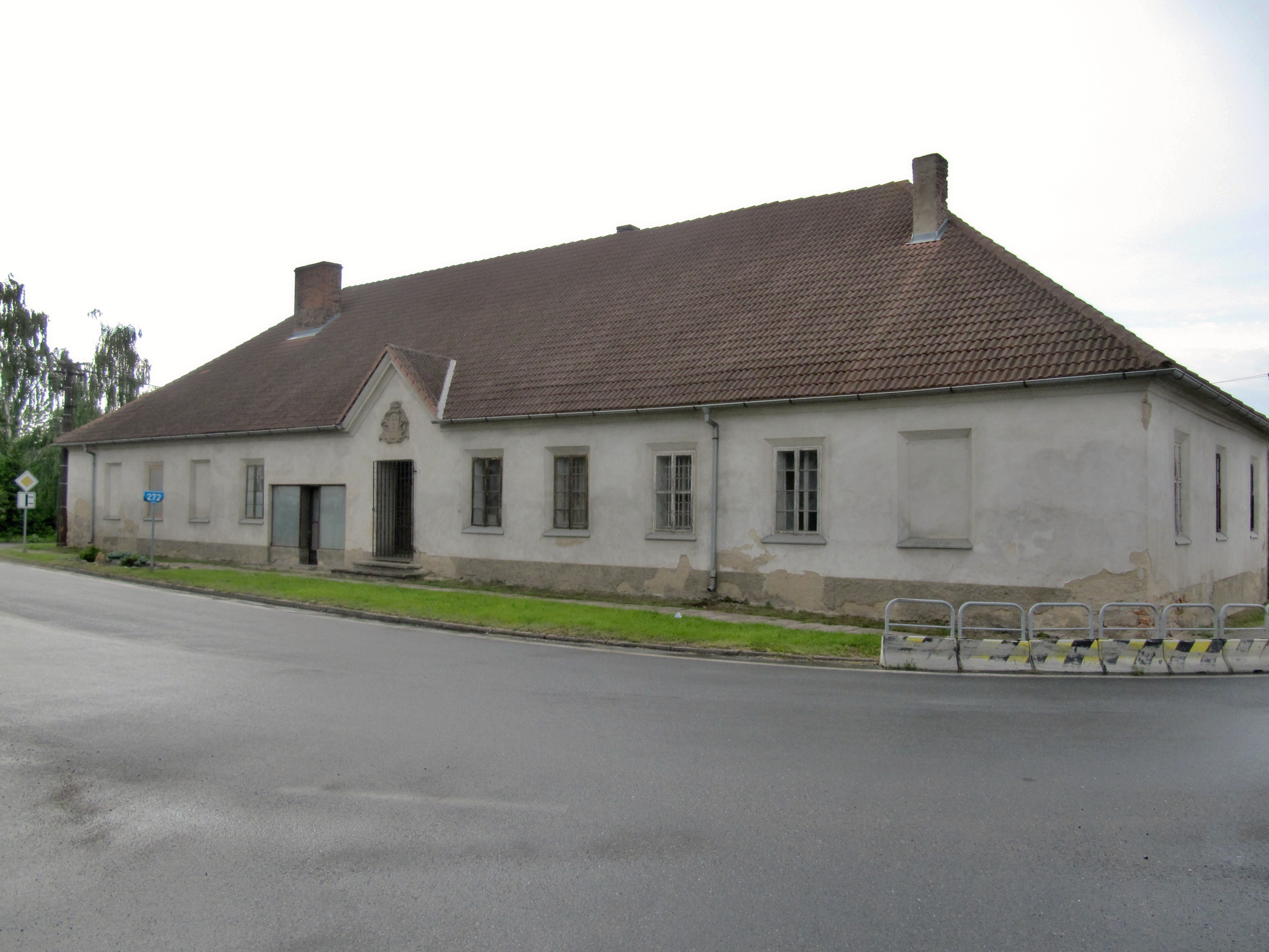 Špitál (Kounice), Kounice 100